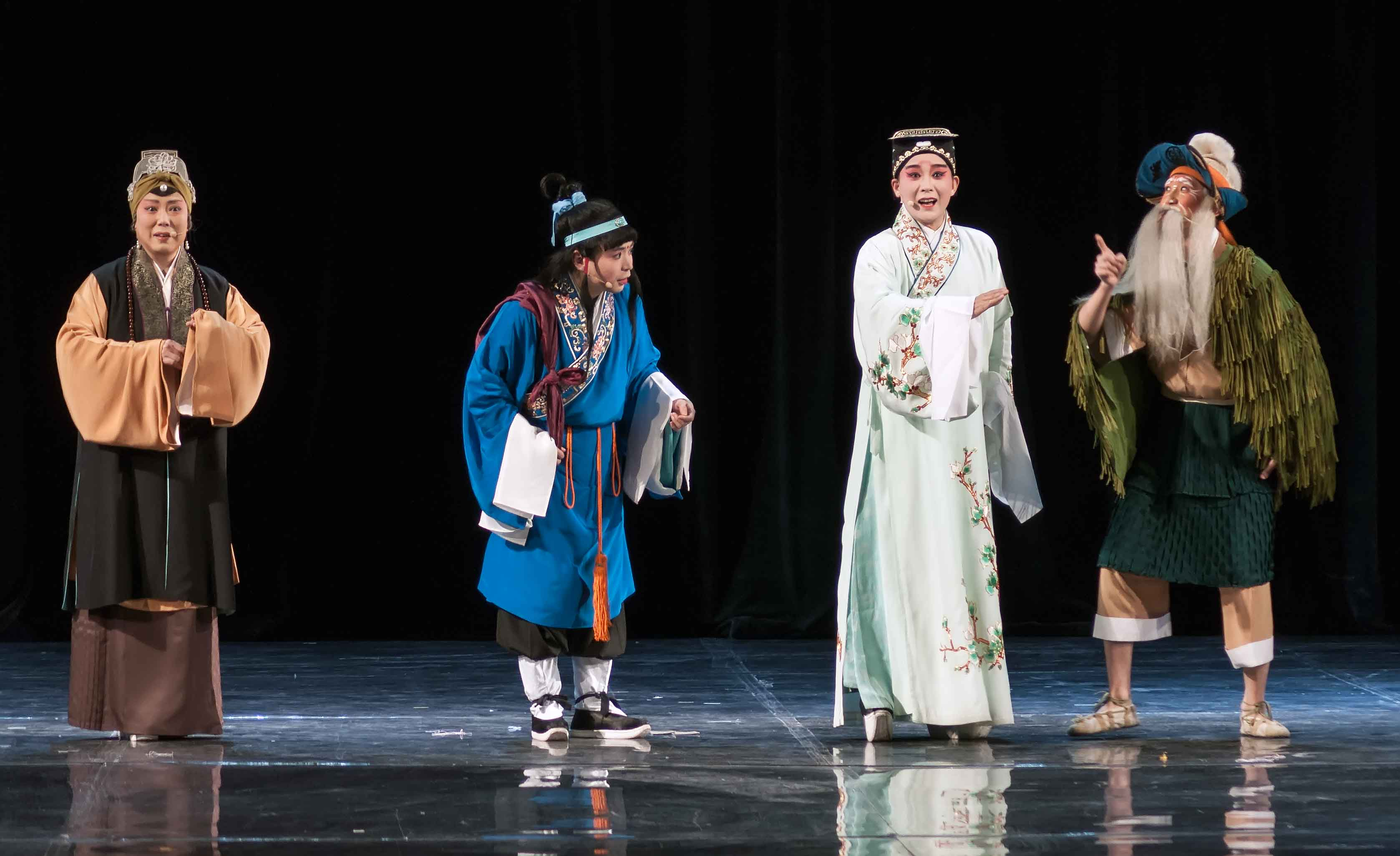 Легенда о нефритовой заколке